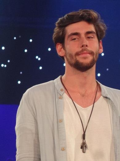 Álvaro Soler bei Die Besten im Sommer in Riesa